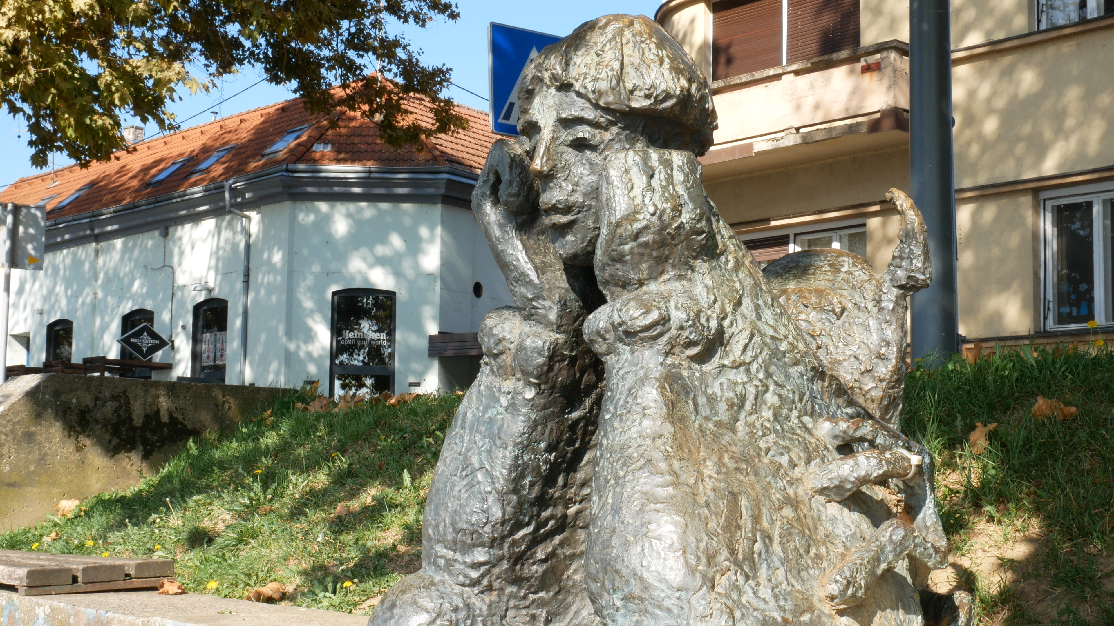 Kip Potjeha u Slavonskom Brodu